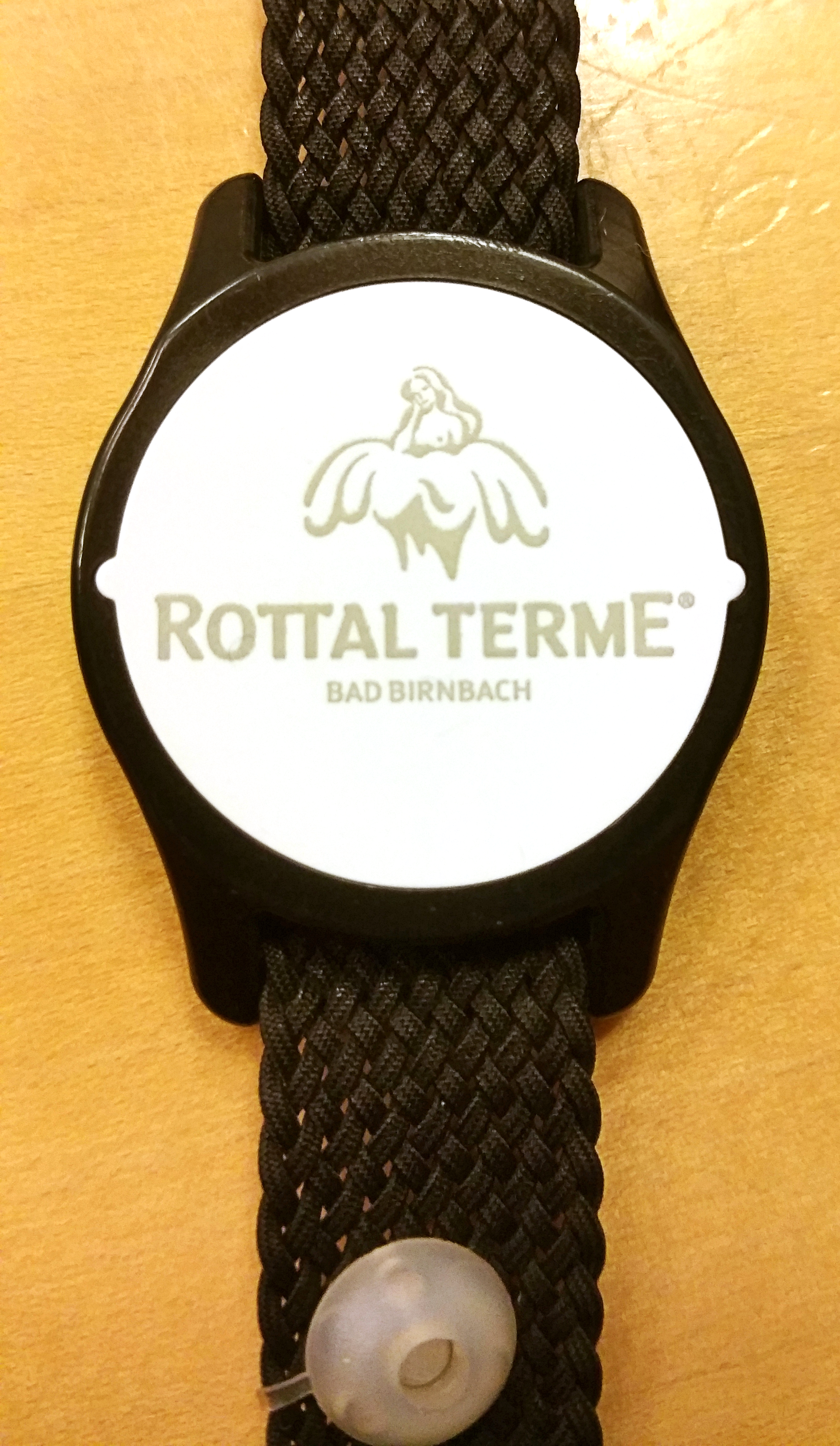 Bad Birnbach, Rottal Terme, Chipband zum Eintritt in den Badebereich